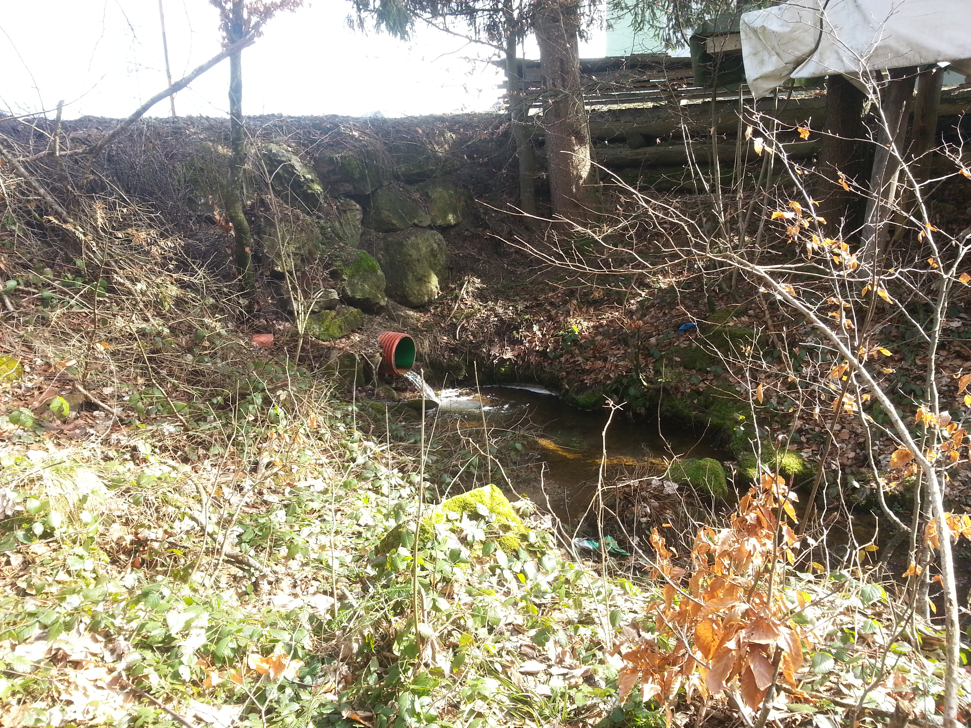 Ursprung des "Alter Bachs" in Koppl bei Salzburg (Österreich)